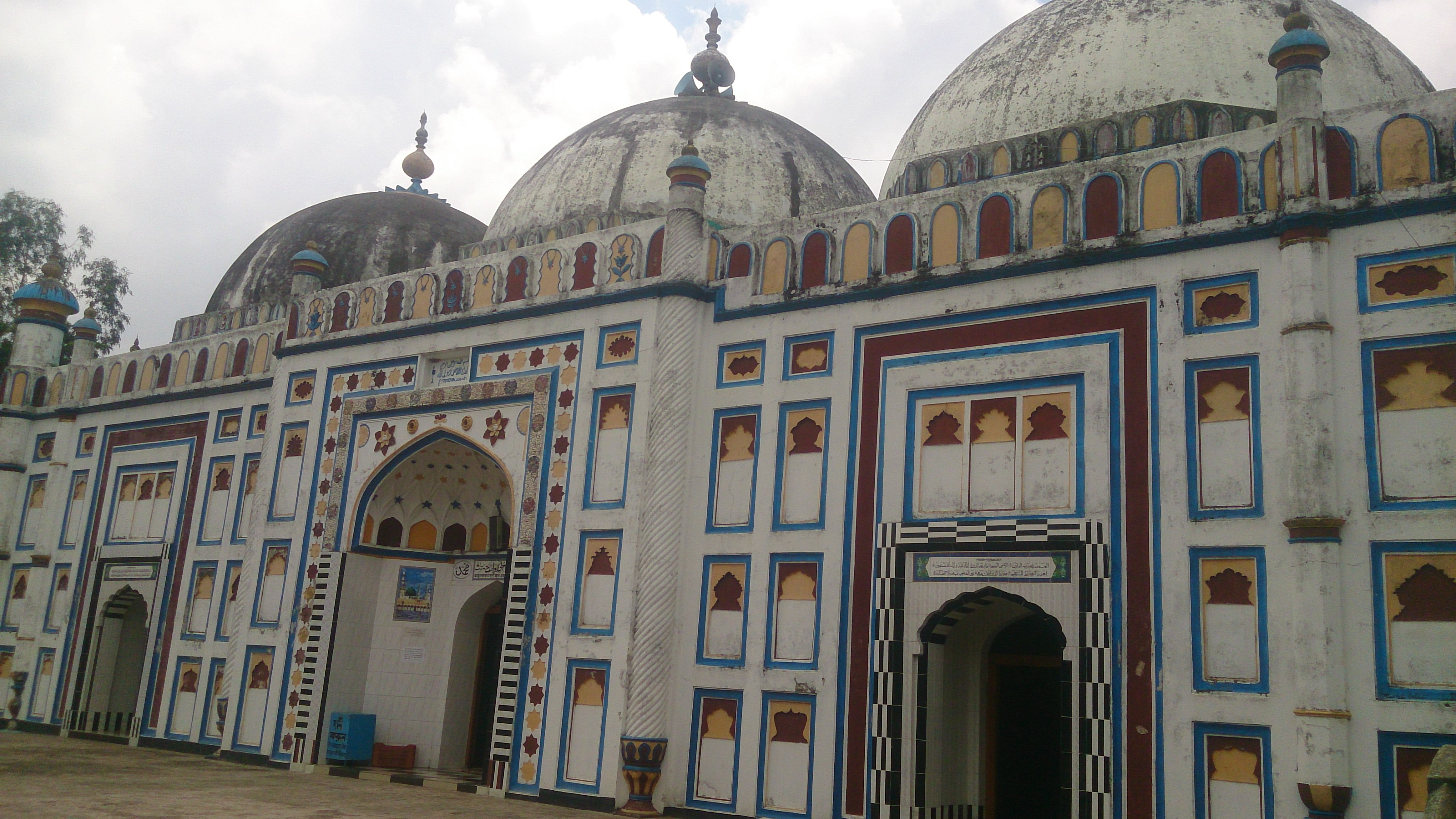 আড়িফাইল মসজিদ